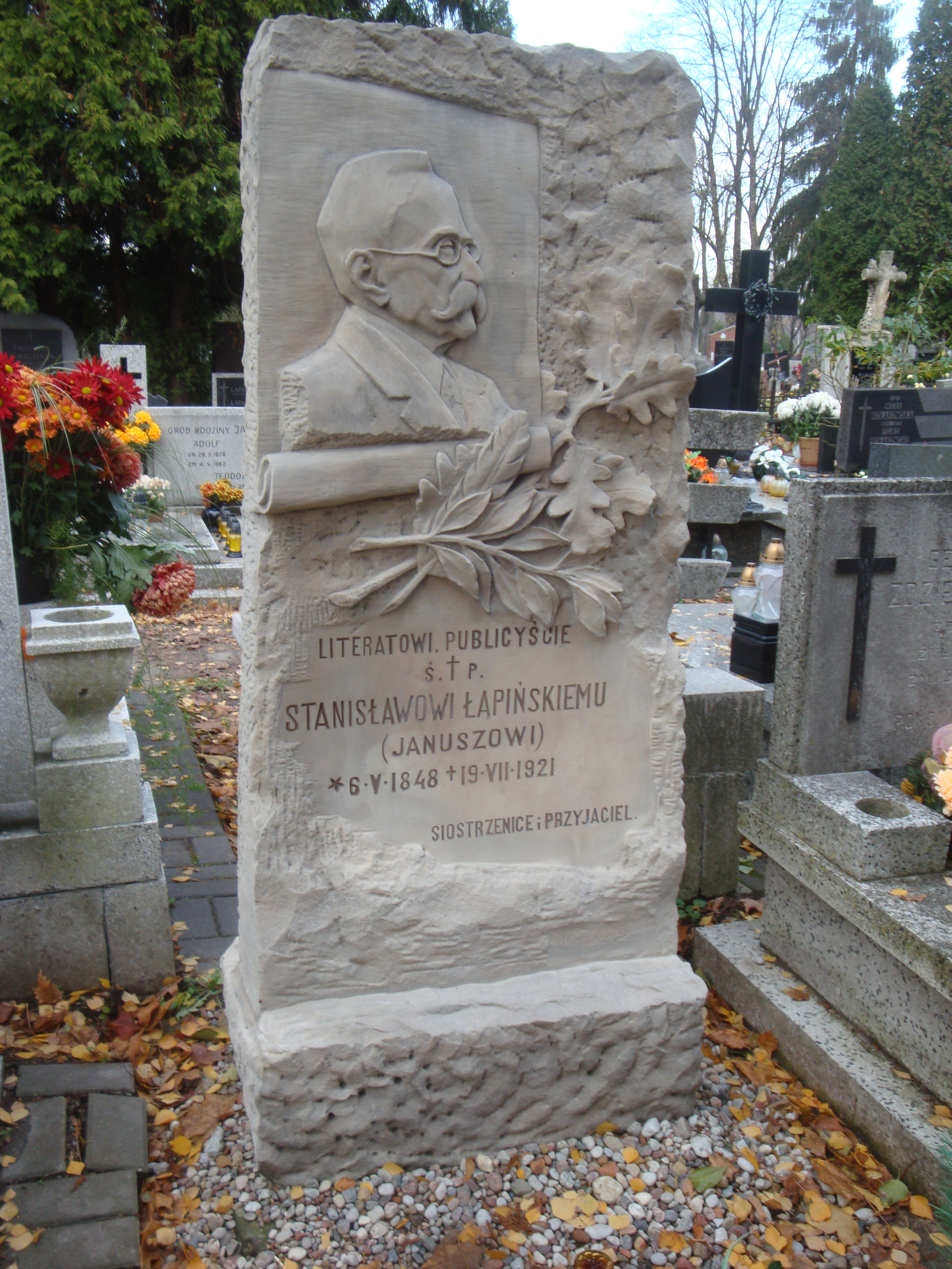 Nagrobek Stanisława Łąpińskiego łódzkiego dziennikarza, publicysty, literata na Starym Cmentarzu w Łodzi fot Mirosław Zbigniew Wojalski odnowiony w 2012